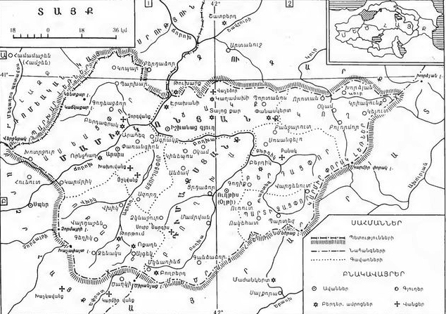 Տայք Նահանգ